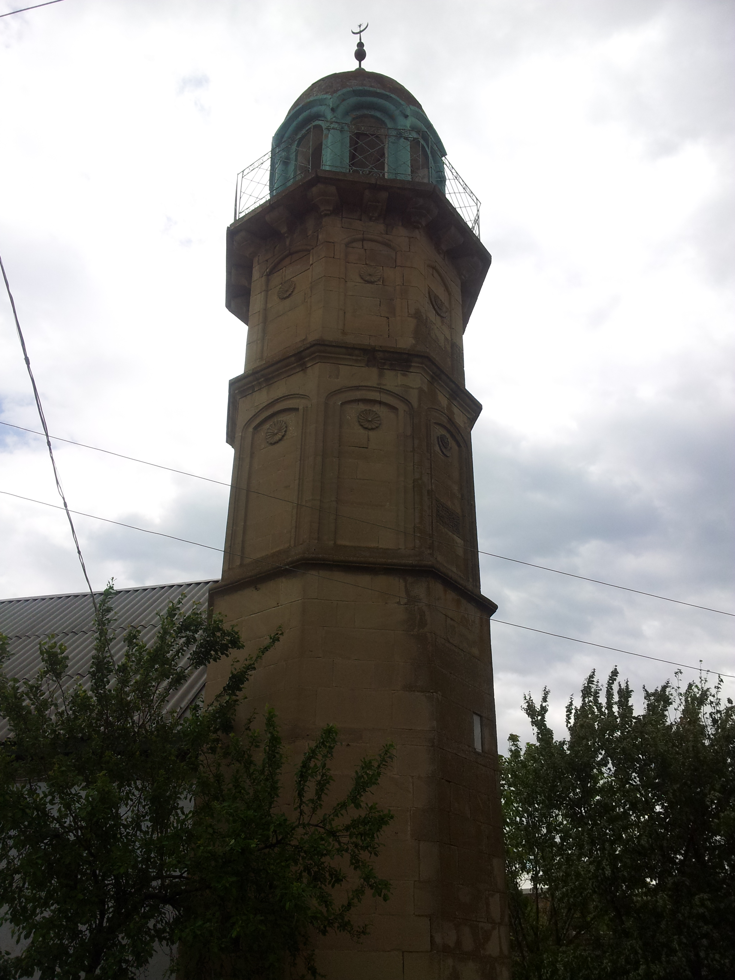 Мечеть в Эндирее